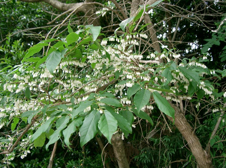 Lyonia ovalifolia subsp. neziki